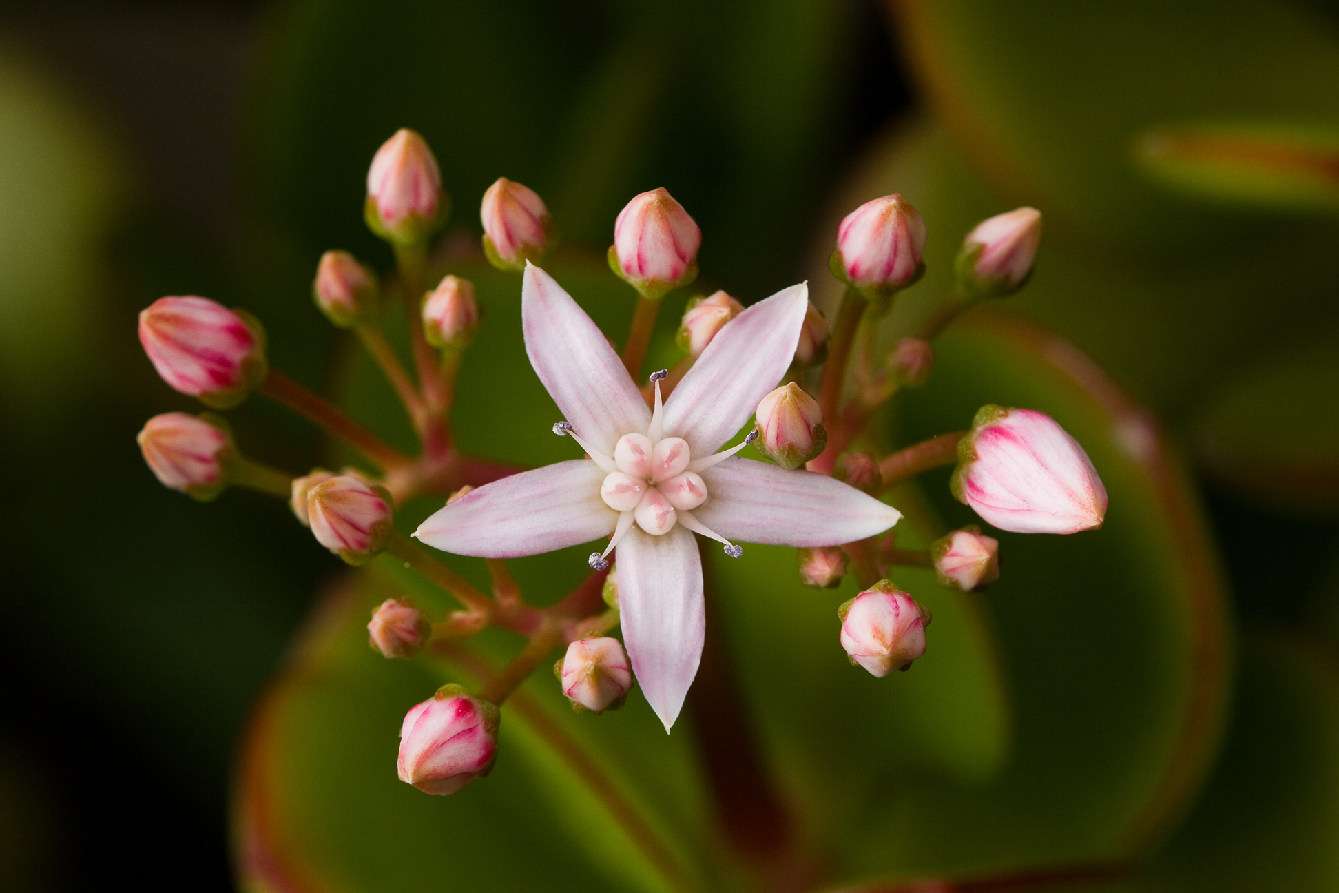 Crassula ovata, Royal Tasmanian Botanical Gardens, Tasmania, Australia